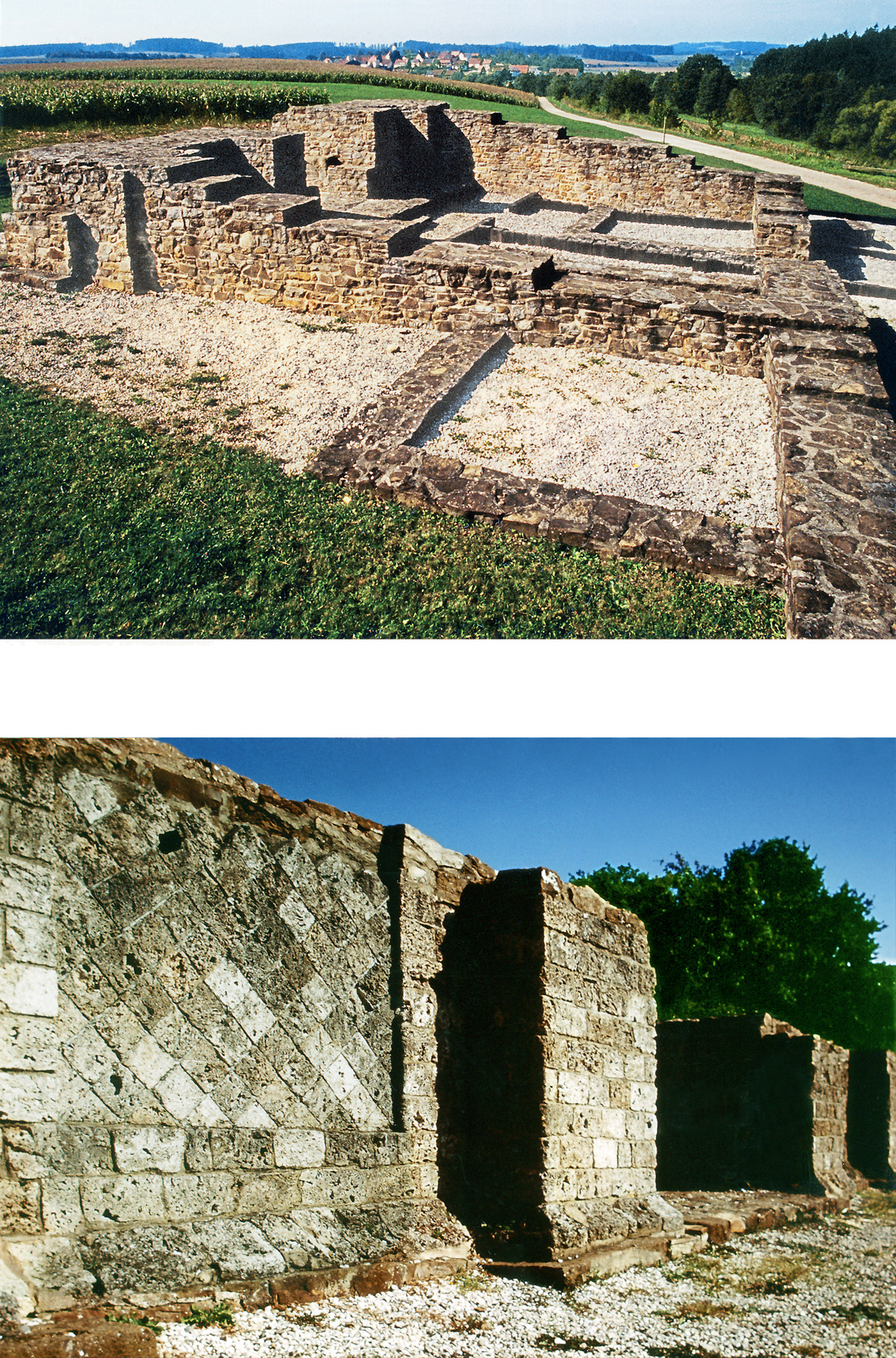 Das restaurierte Limestor bei Dalkingen mit seinen fünf Ausbauphasen. Die mächtige Torfront wurde aus Anlaß des Limesbesuchs von Kaiser Caracalla 213 errichtet. Diese Aufnahmen wurden 2009 mit einem Canon CanoScan 5200F von einem Diafilm digitalisiert. Zustand im Juli 1995.